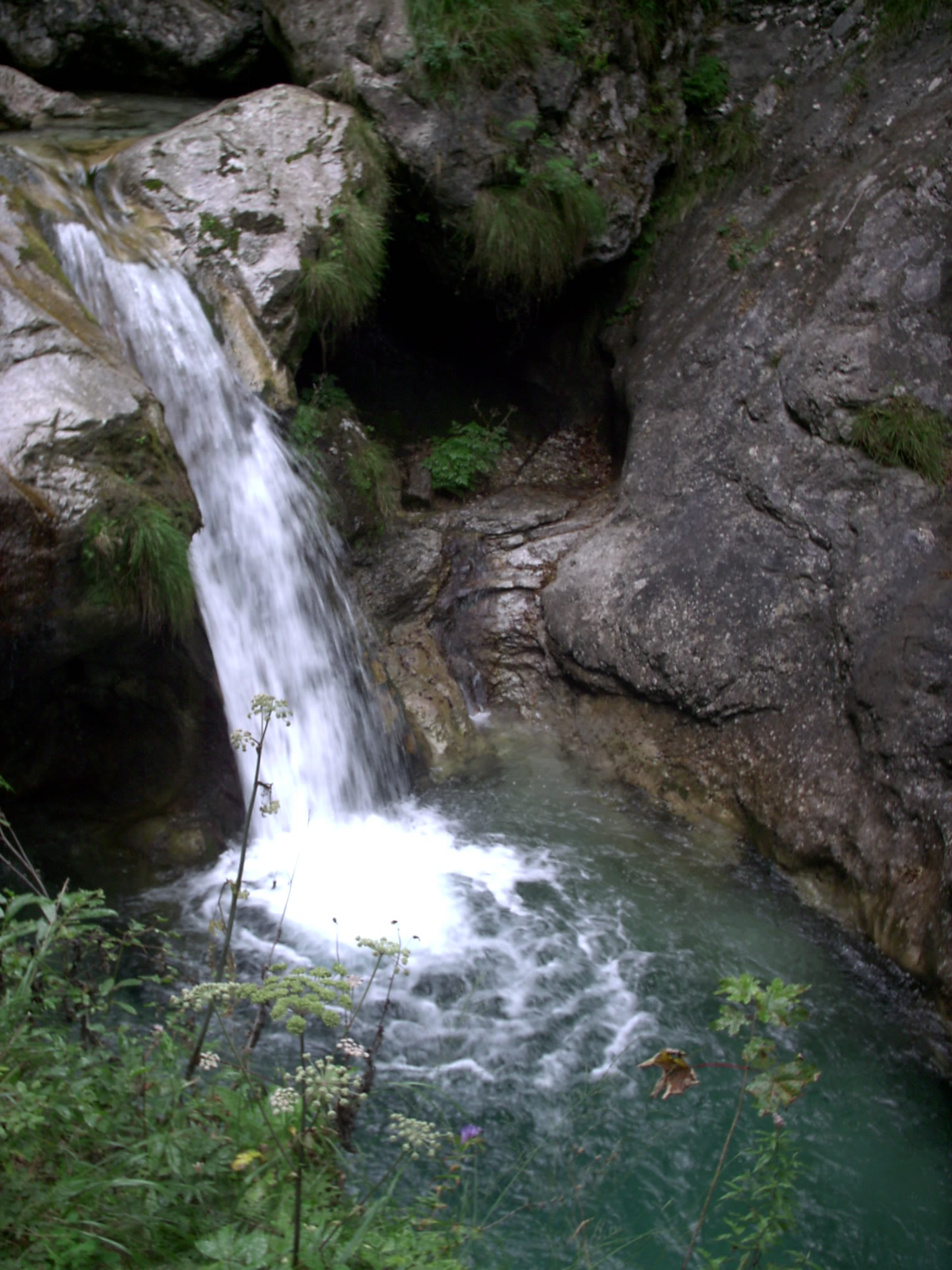 Val Vertova, Bergamo, Italia